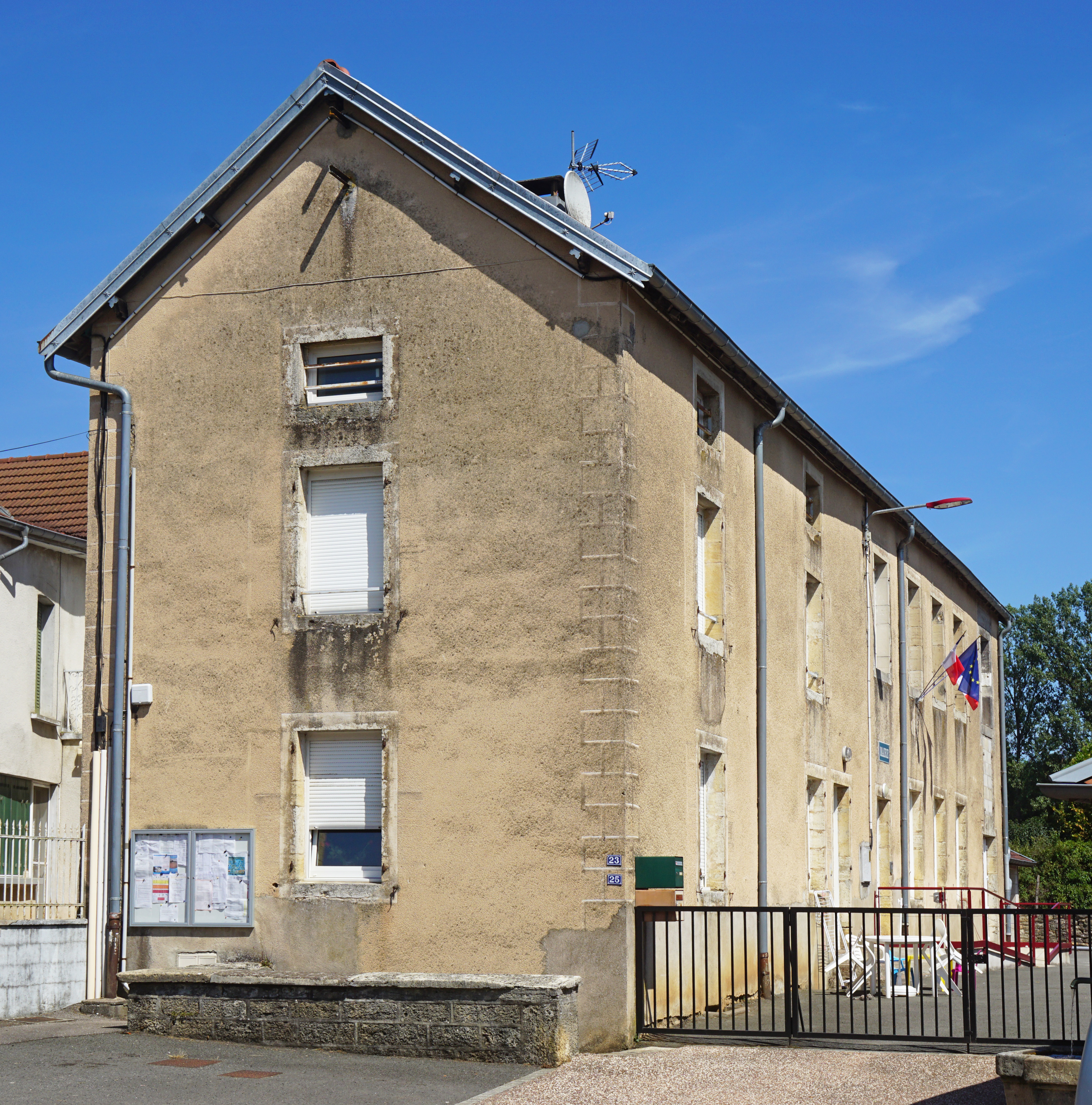 La mairie de Vauchoux.